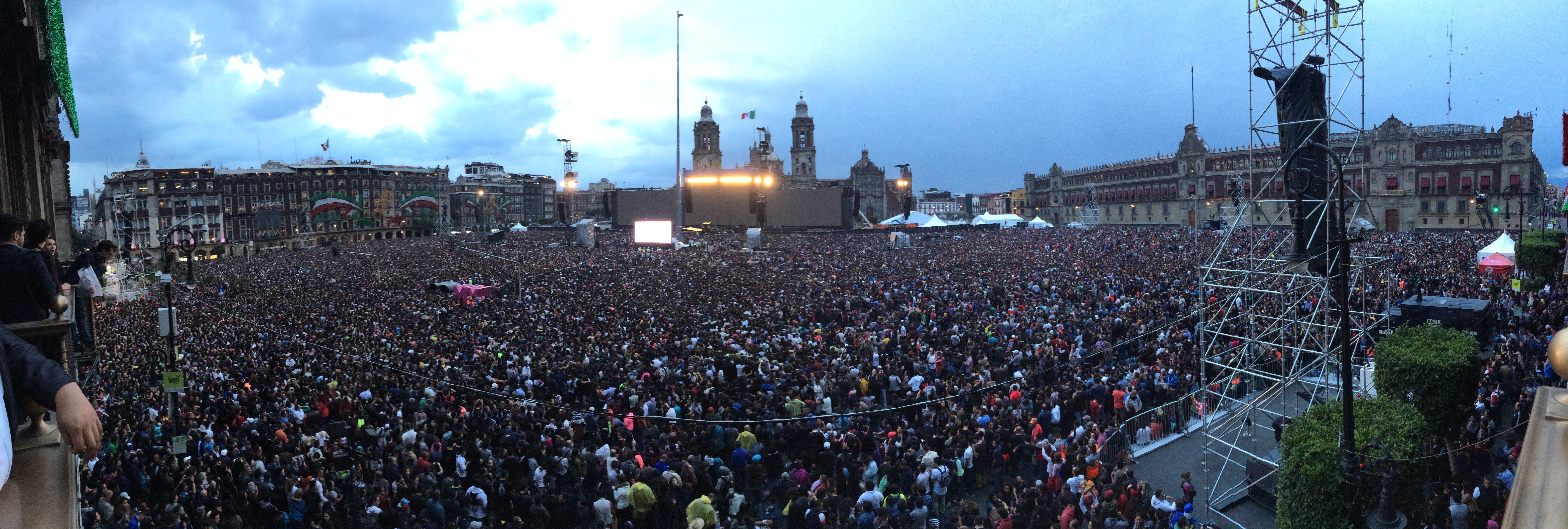 Concierto masivo de Roger Waters en el Zócalo de la CDMX.